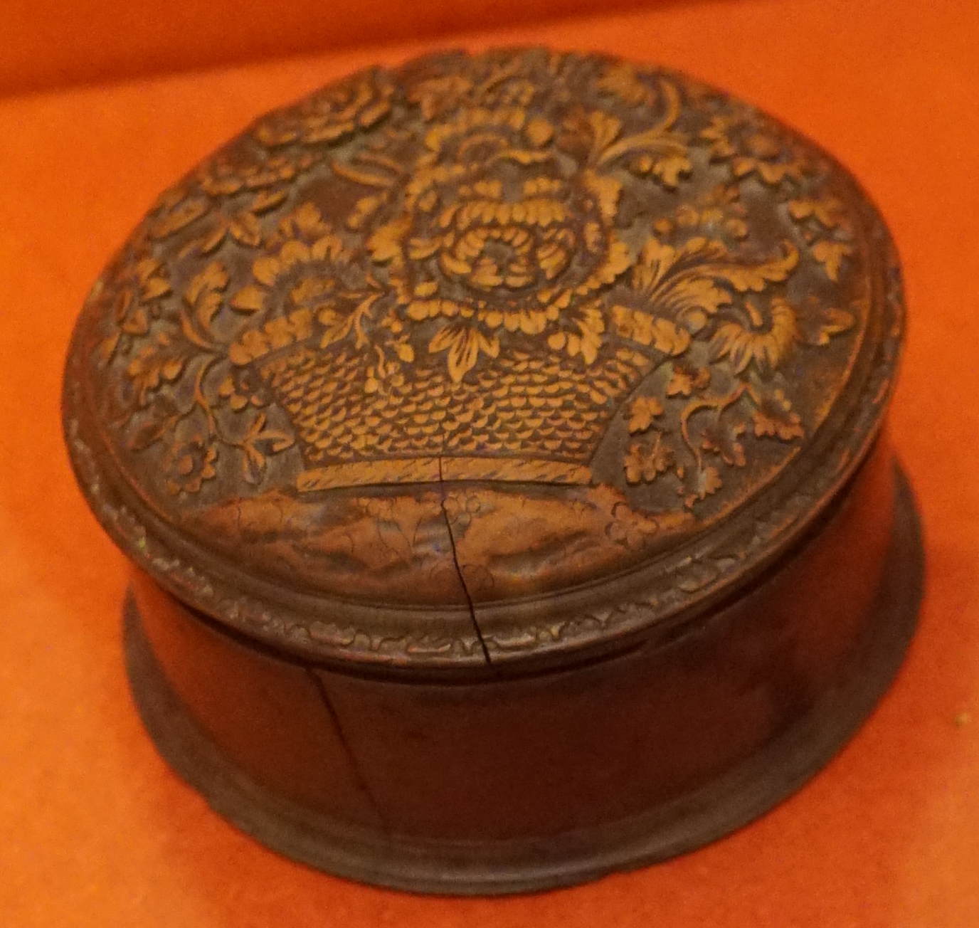 présenté au musée d'art sacré.